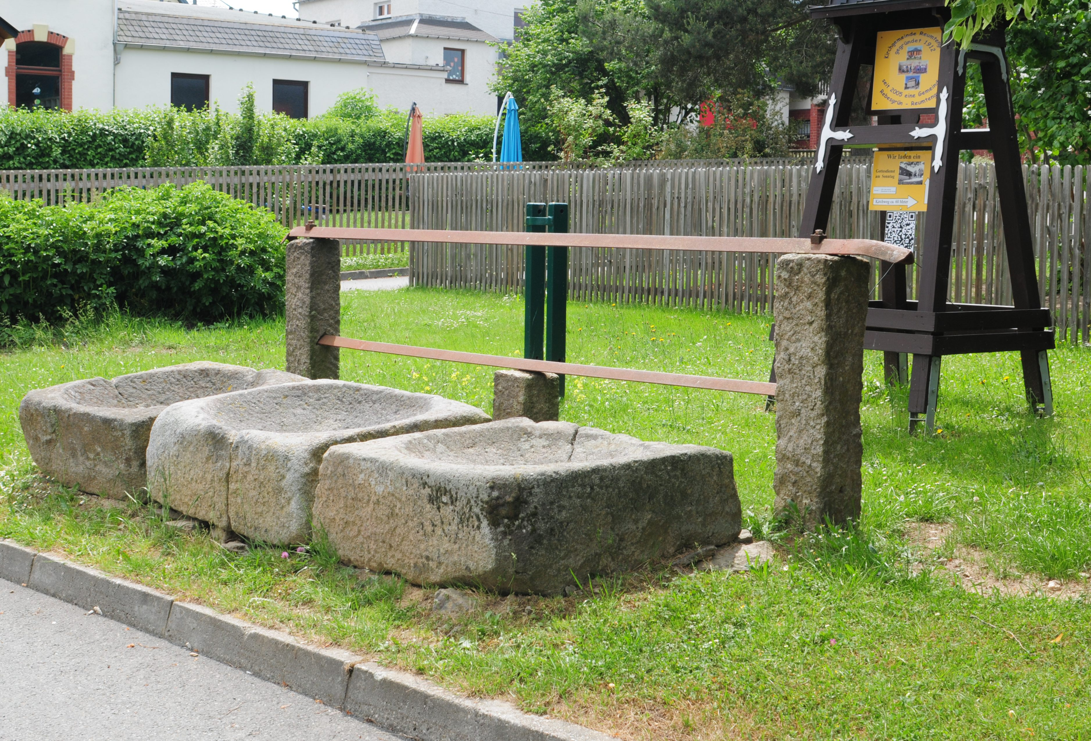 Auerbach/Vogtl., Ortsteil Reumtengrün, Griebenherde aus Granit (Vogtlandkreis, Freistaat Sachsen, Deutschland)